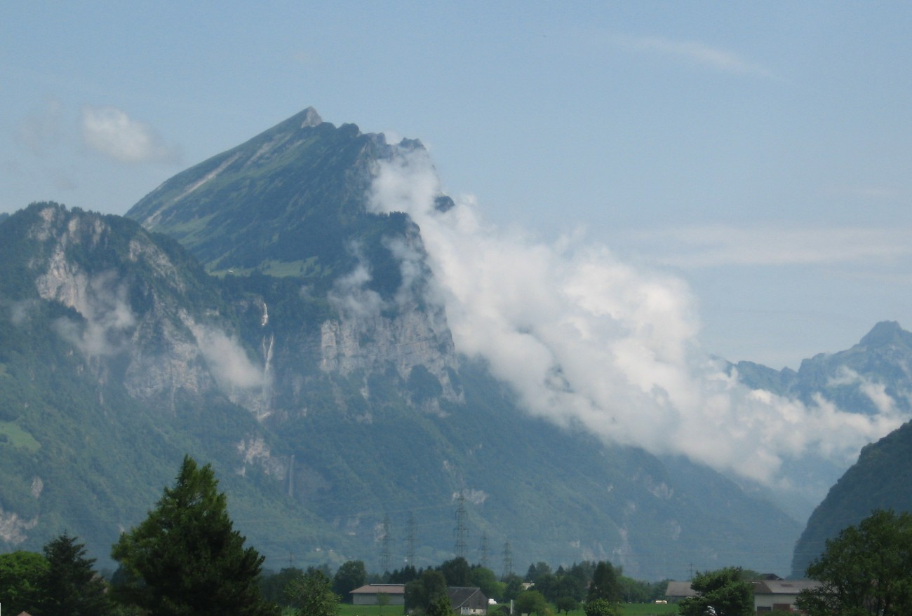 Leistchamm aus Linthebene von Westen gesehen